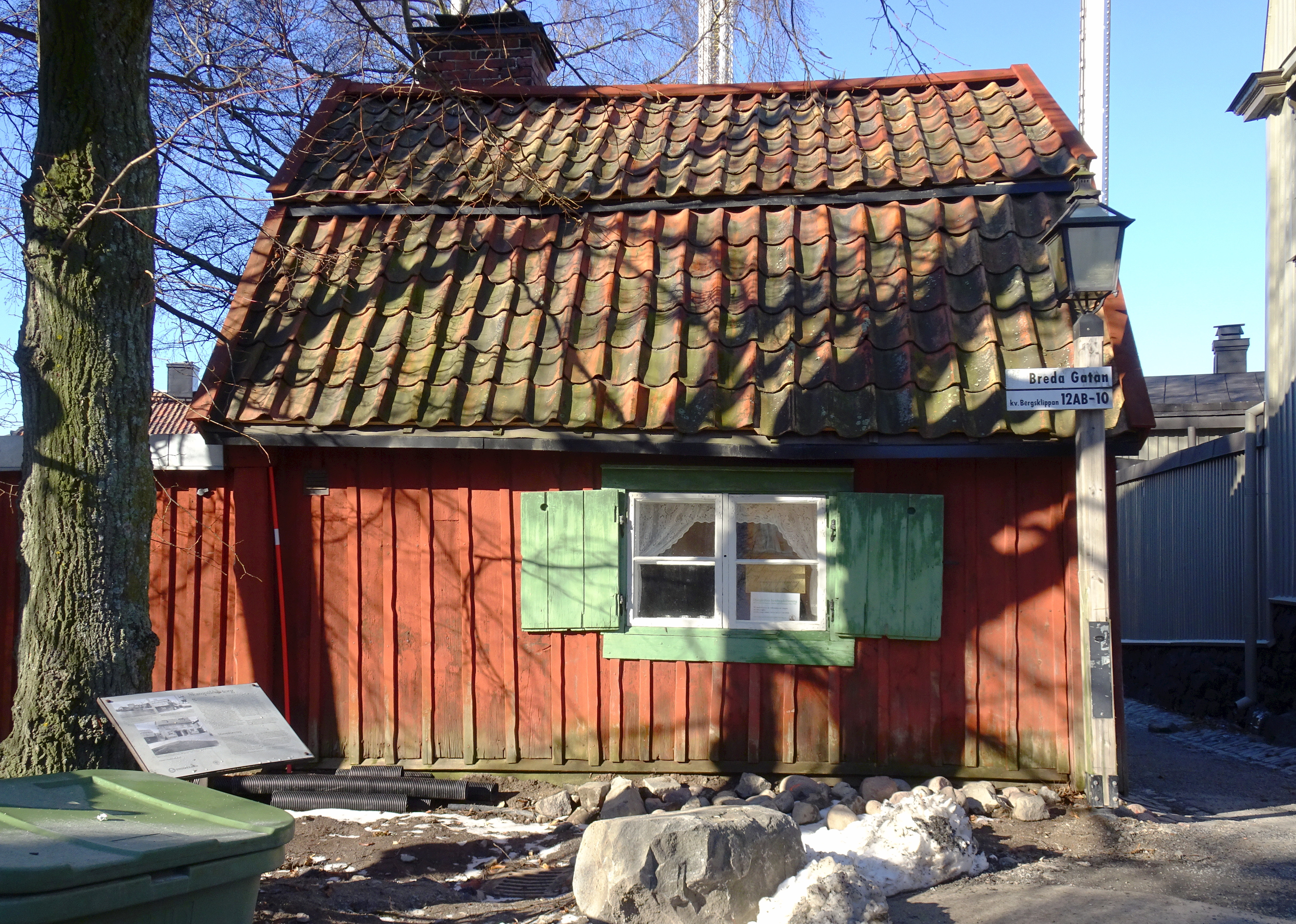 Skampålens torg, Djurgårdens hembygdsföreningens stuga